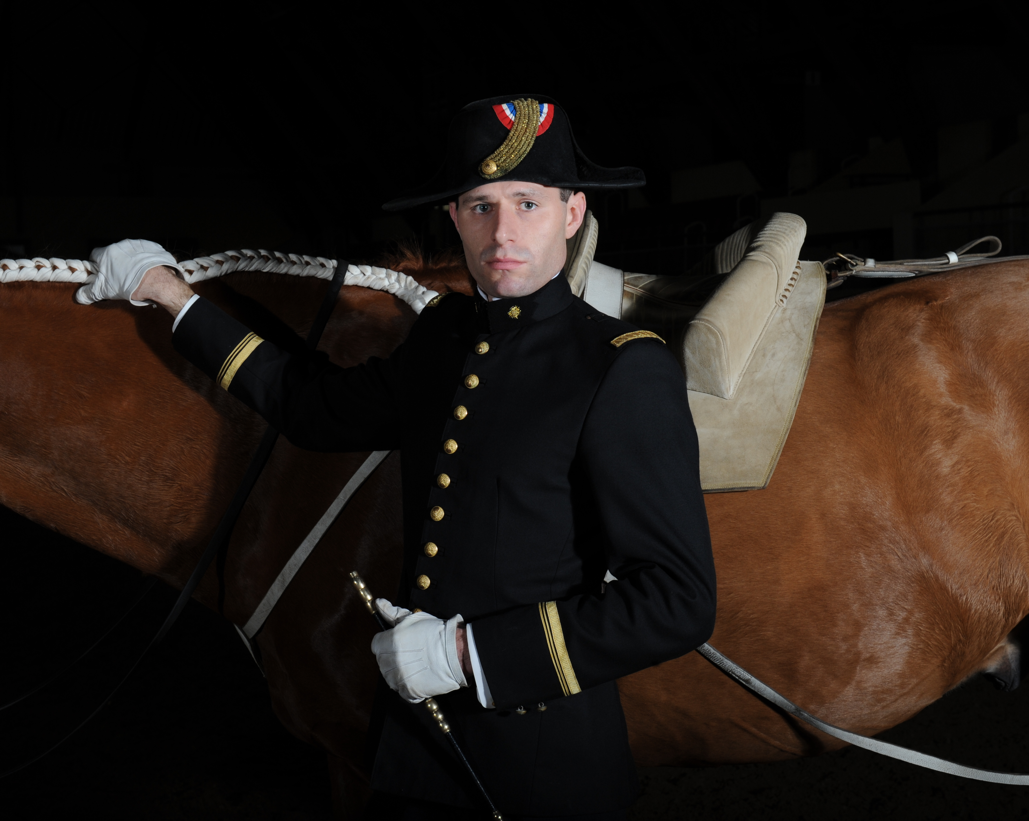 Écuyer civil du cadre noir.